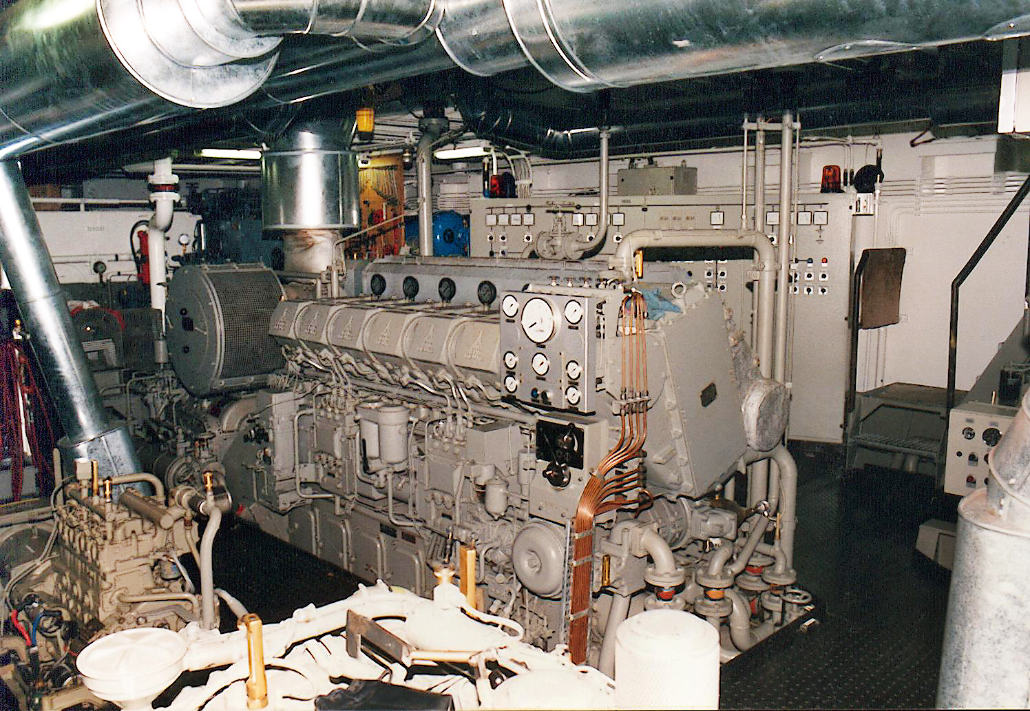 6-Zylinder-V-Schiffs-Dieselmotor der Deutz-Baureihe 628, 1200 PS (Originalangabe: 12 Zylinder)